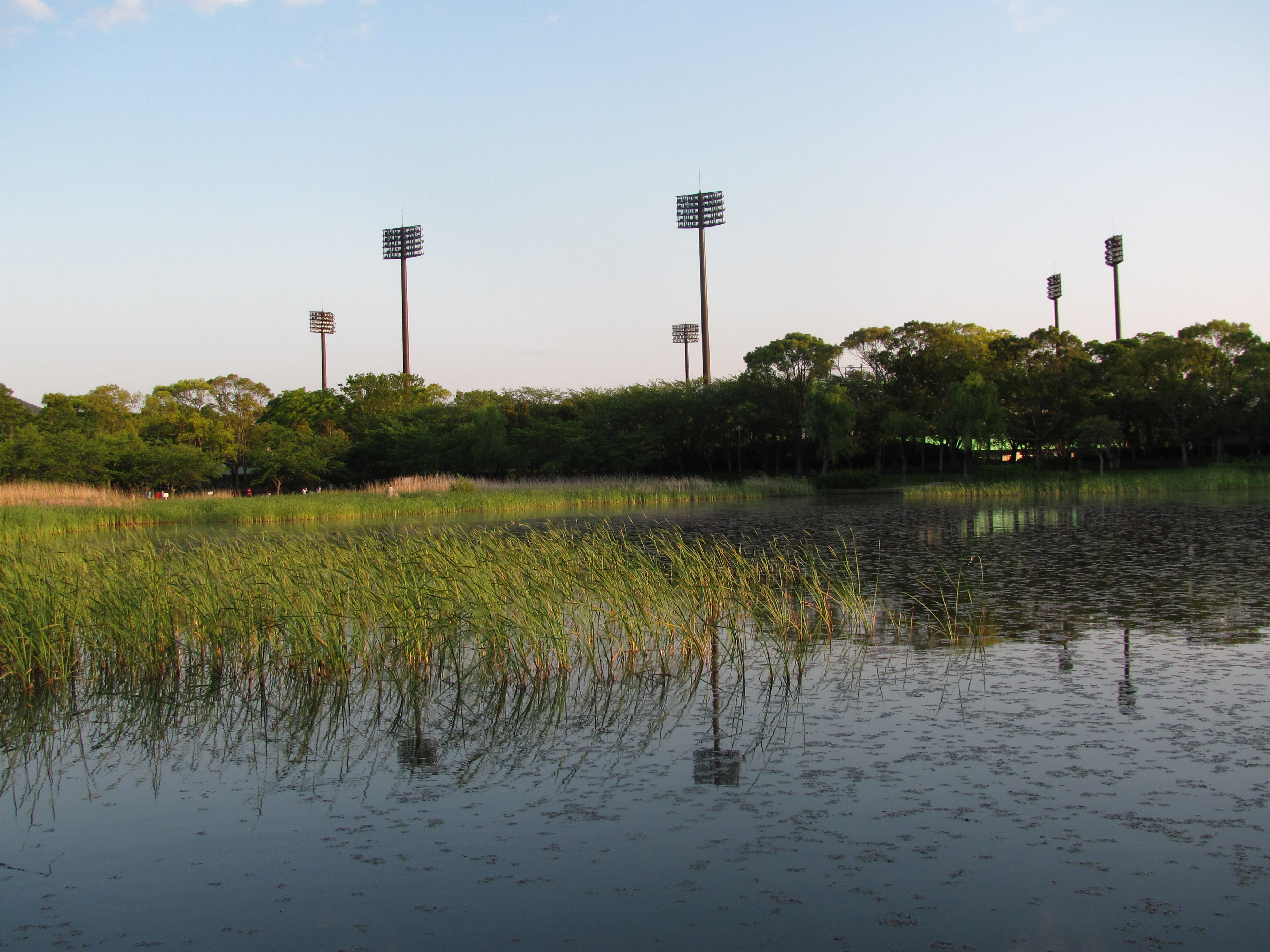 水神池からみた市民球場